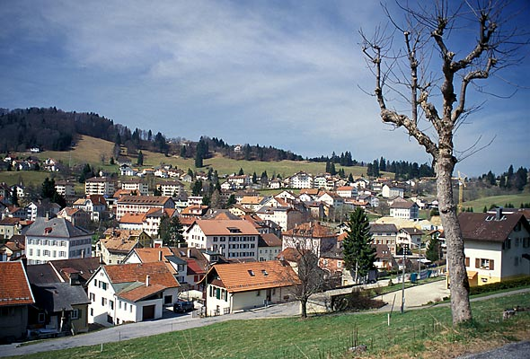 Sainte-Croix im Waadtländer Jura